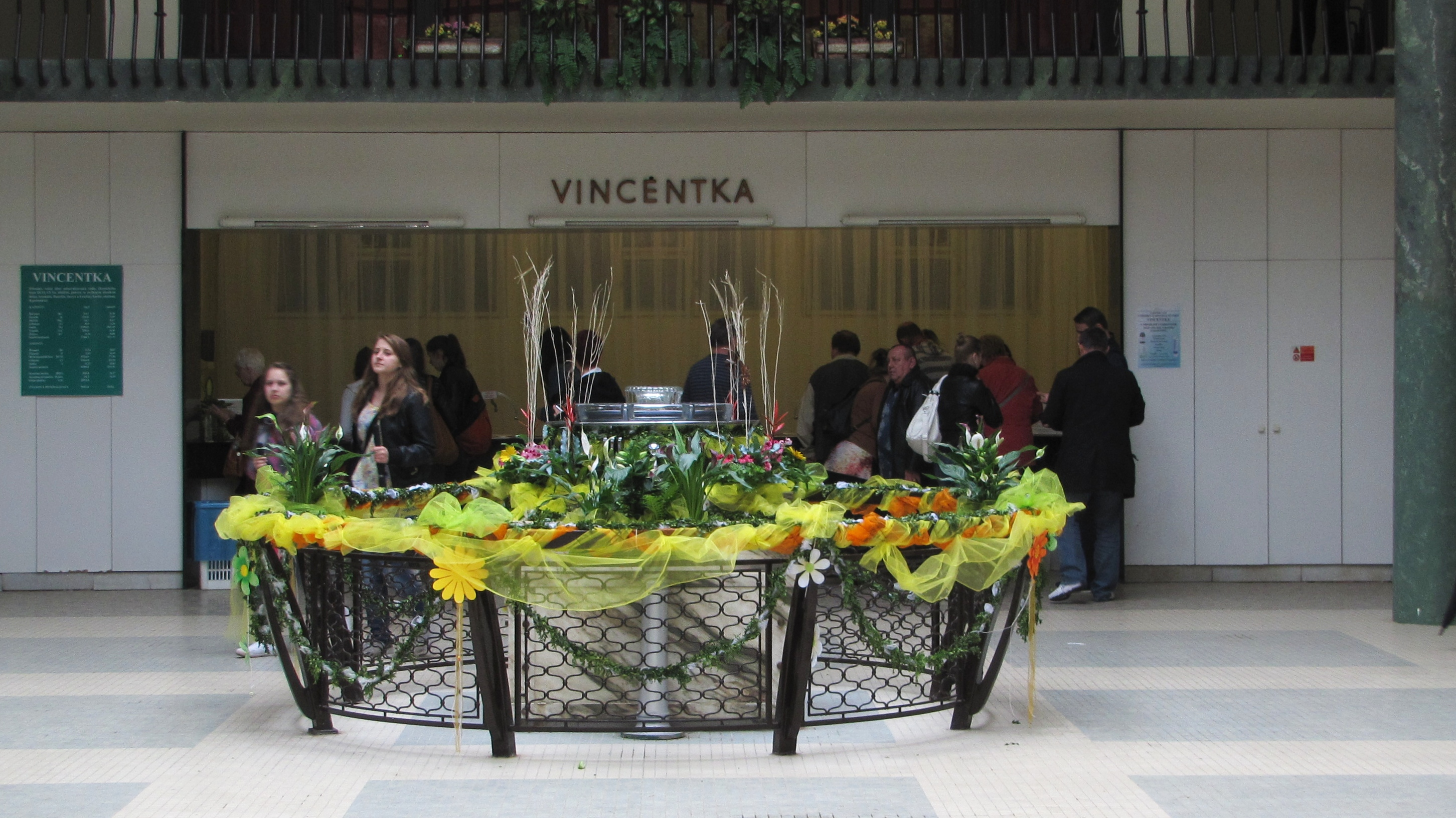 Pramen Vincentka v Luhačovicích